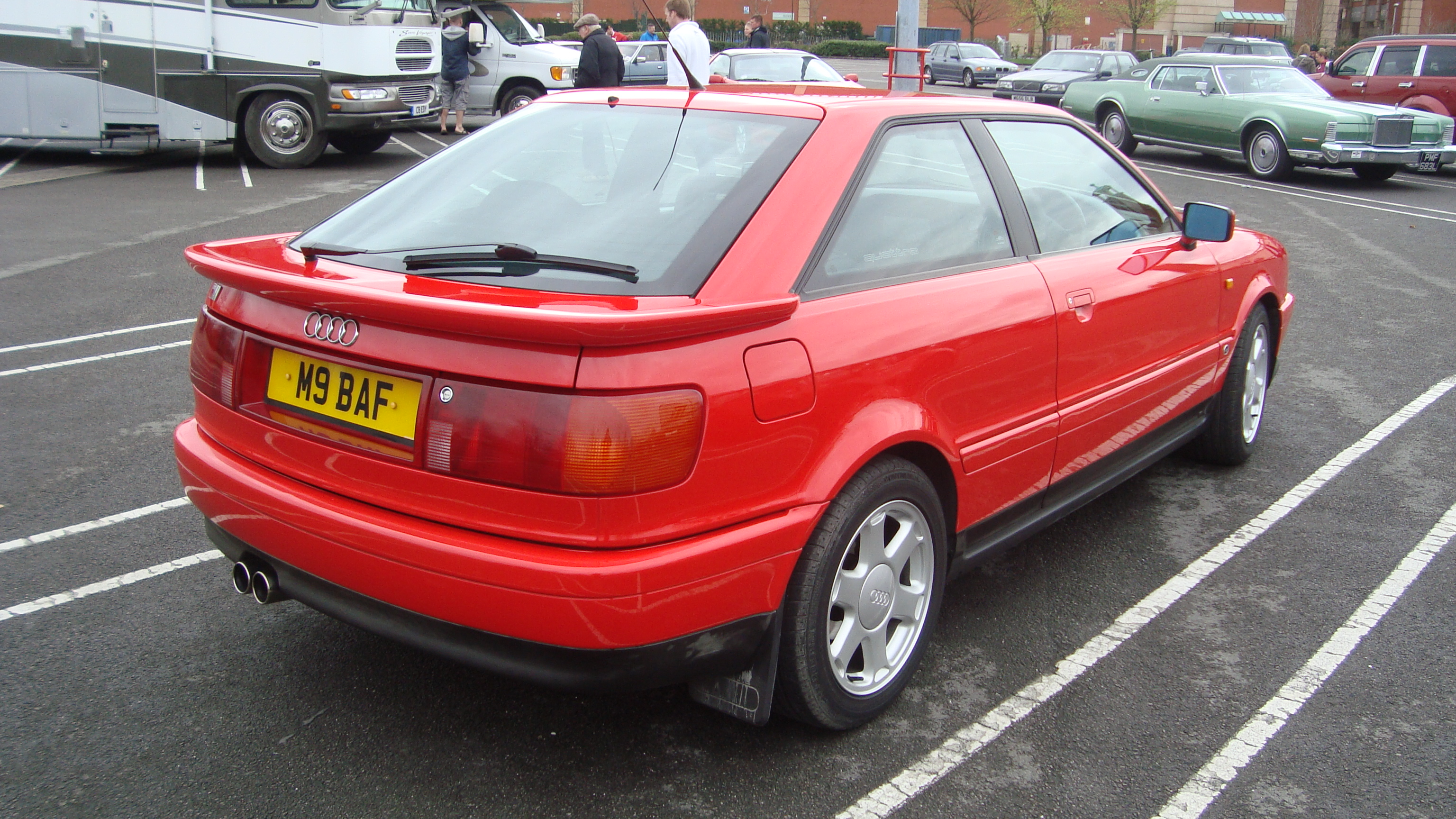 1996 Audi S2 Coupe